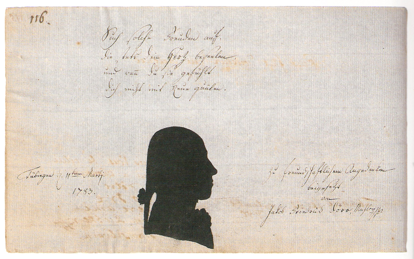 Stammbuchblatt: Silhouette und Eintrag von Jakob Friedrich Dörr im Stammbuch eines Studenten auf Seite 116